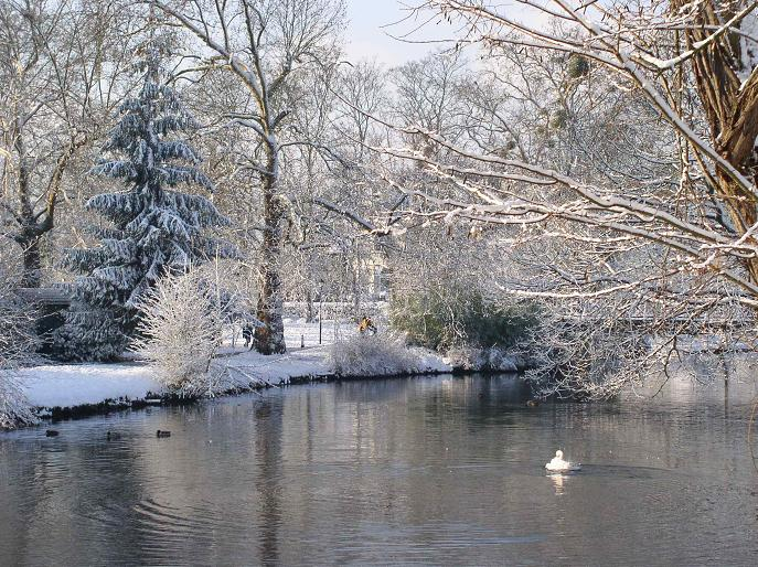 park ibis